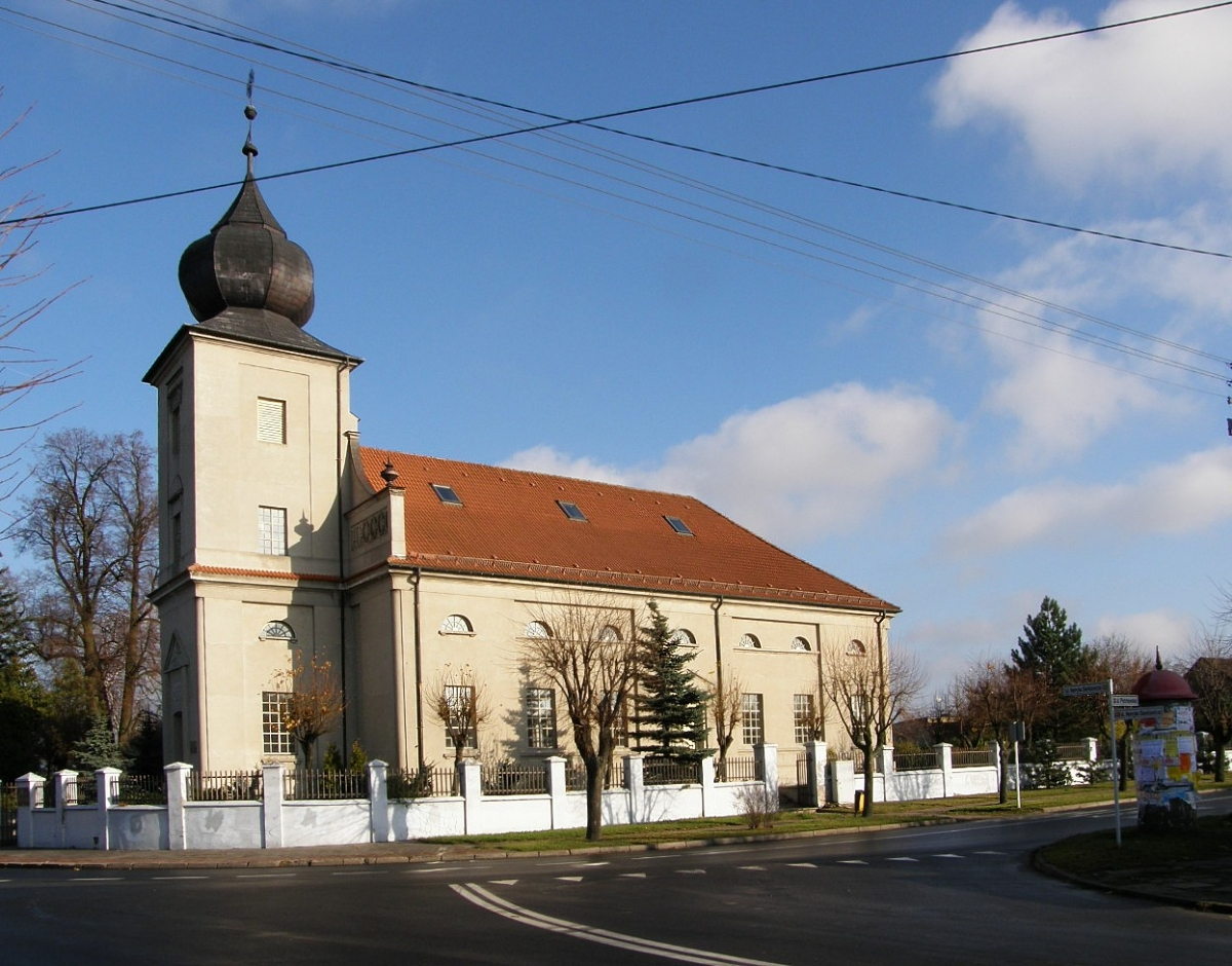 Zelów_kościół-ewangielicko-reformowany.